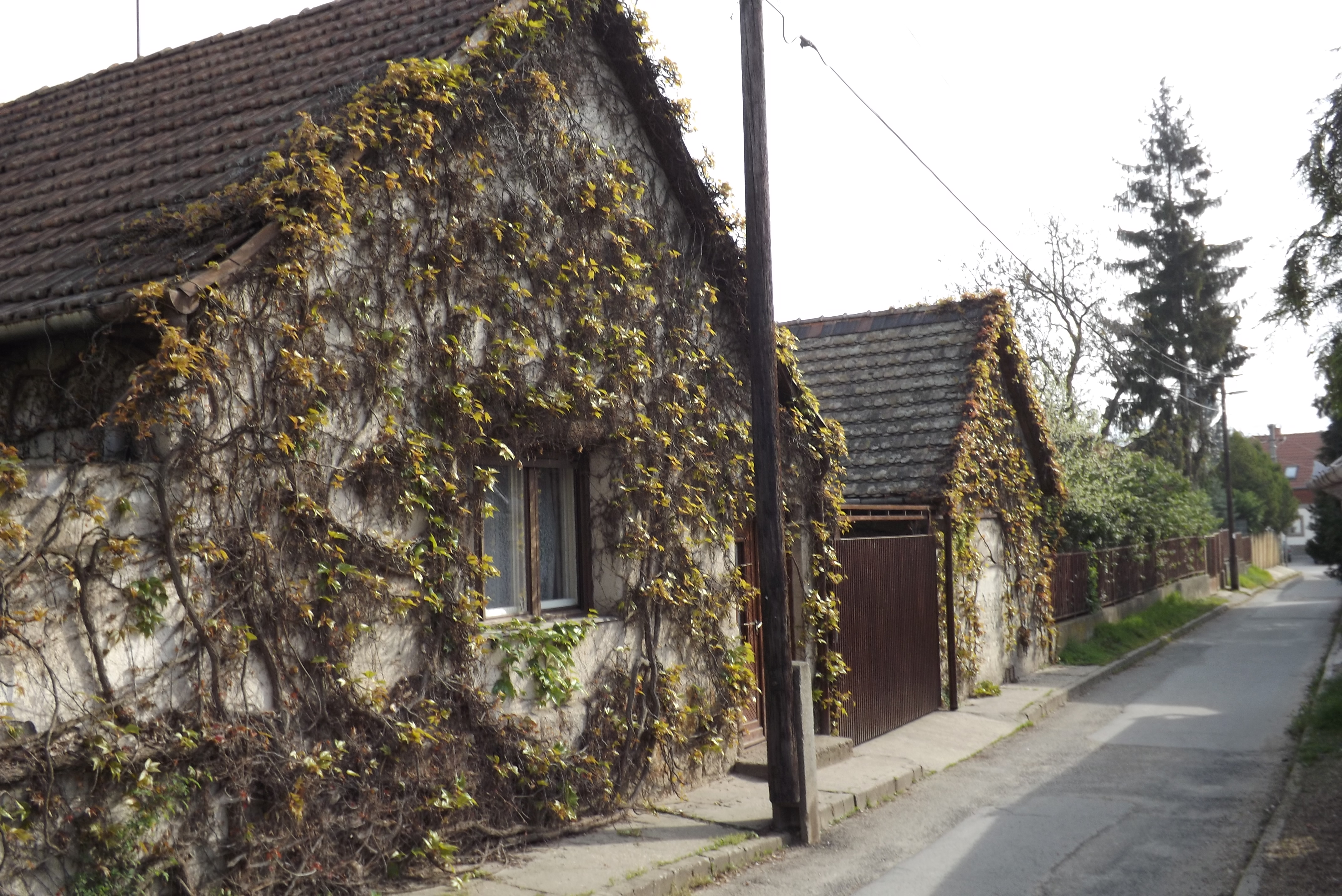 Verőcei utcarészlet